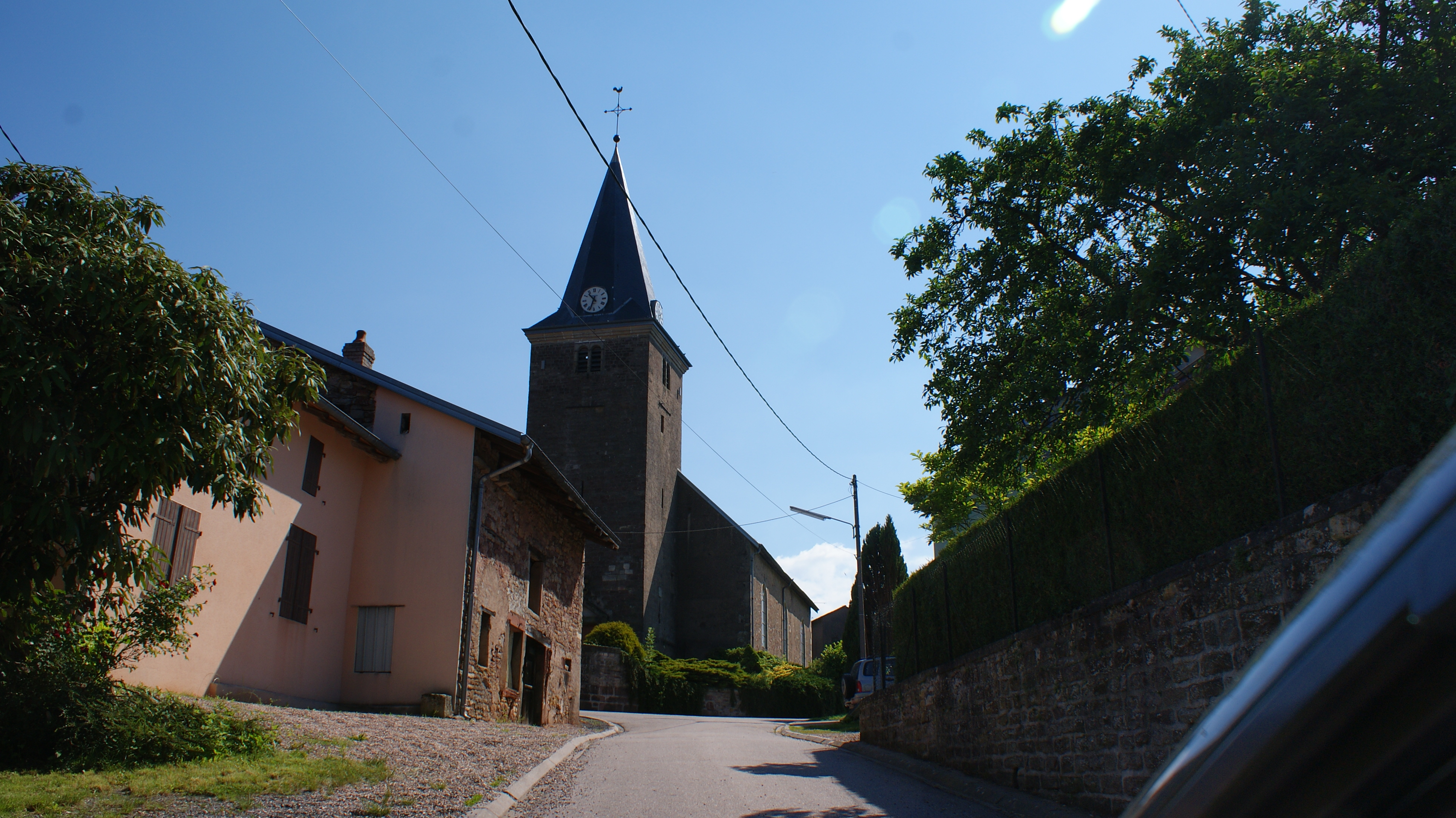 eglise du village